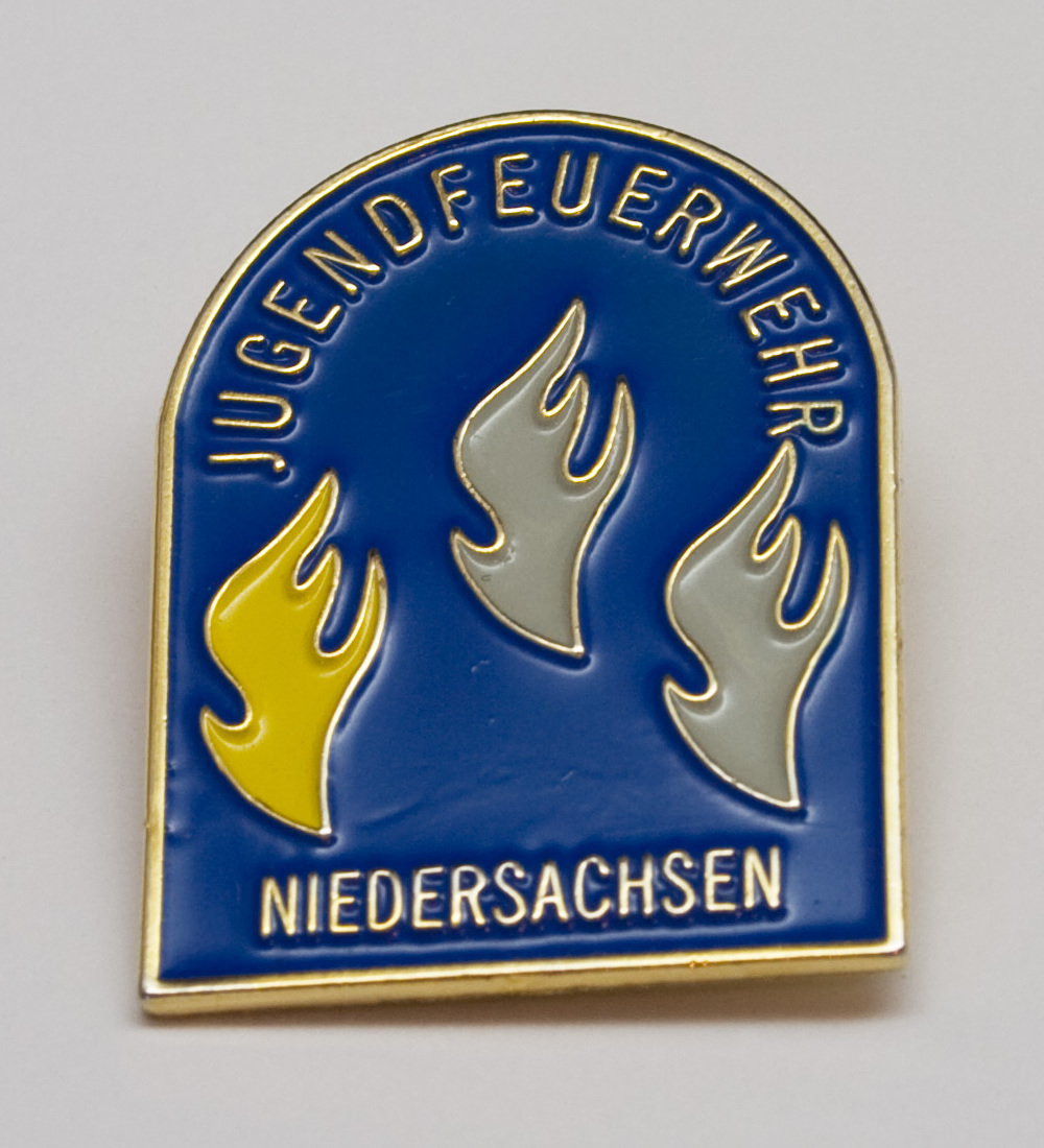 Jugendflamme Stufe1 aus Niedersachsen